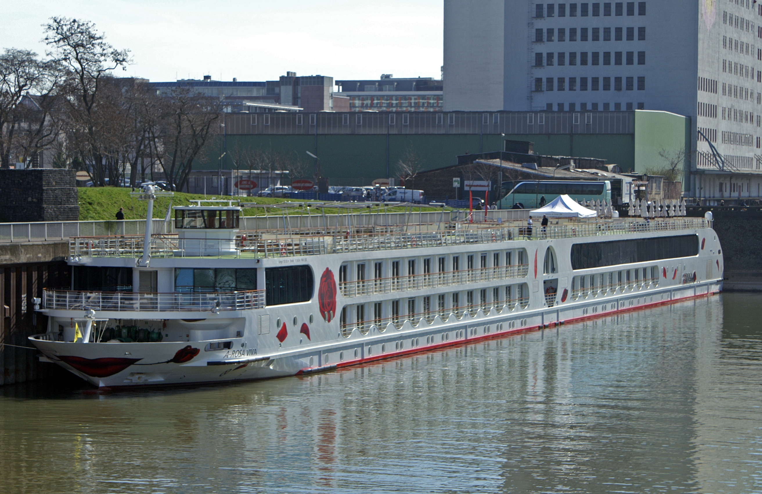 Flusskreuzfahrtschiff A-Rosa Viva im Deutzer Hafen in Köln.